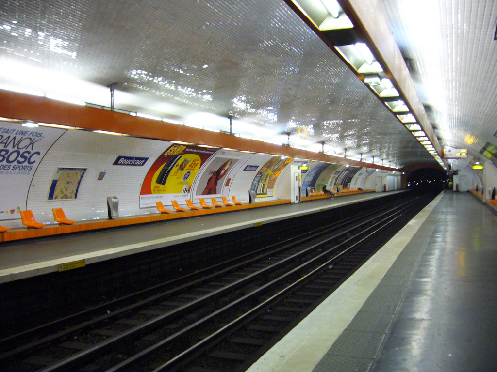 Joseph-André Motte (Français, 1925-2013): siège "Motte", RATP 1973, coque en tôle 10/20 emboutie et émaillée sur banc maçonné et carrelé, station Boucicaut sur la ligne 8 du métro de Paris.